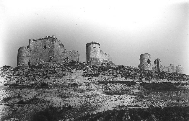 Castillo - Íscar (Valladolid) - Ediciones Alarde - Oviedo. Lote Nº 1876. Es una postal no circulada. Repetida - Tarjeta postal. Papel 140 x 90 B/N